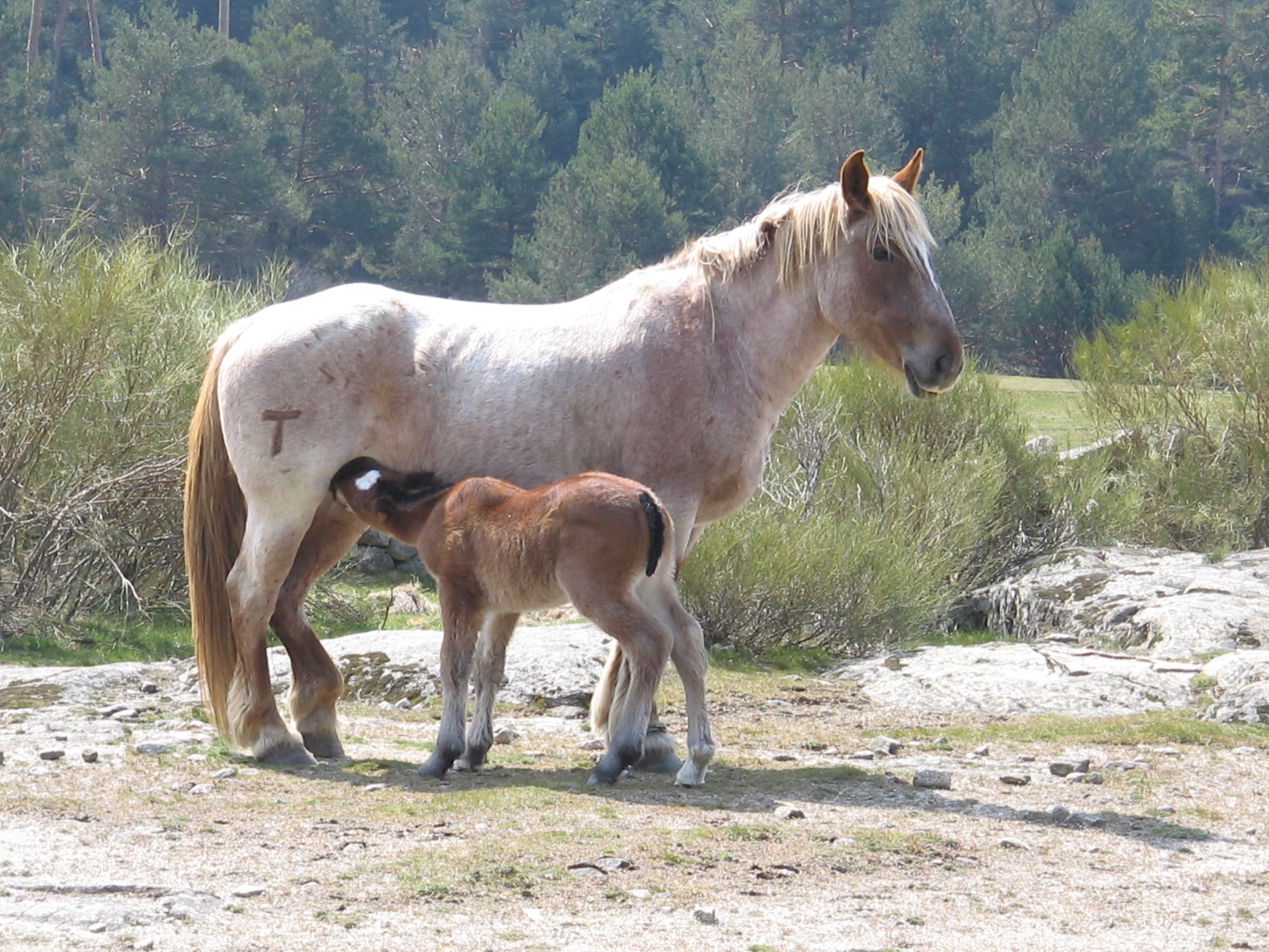 Caballos en la Sierra de Gredos (Ávila, España).